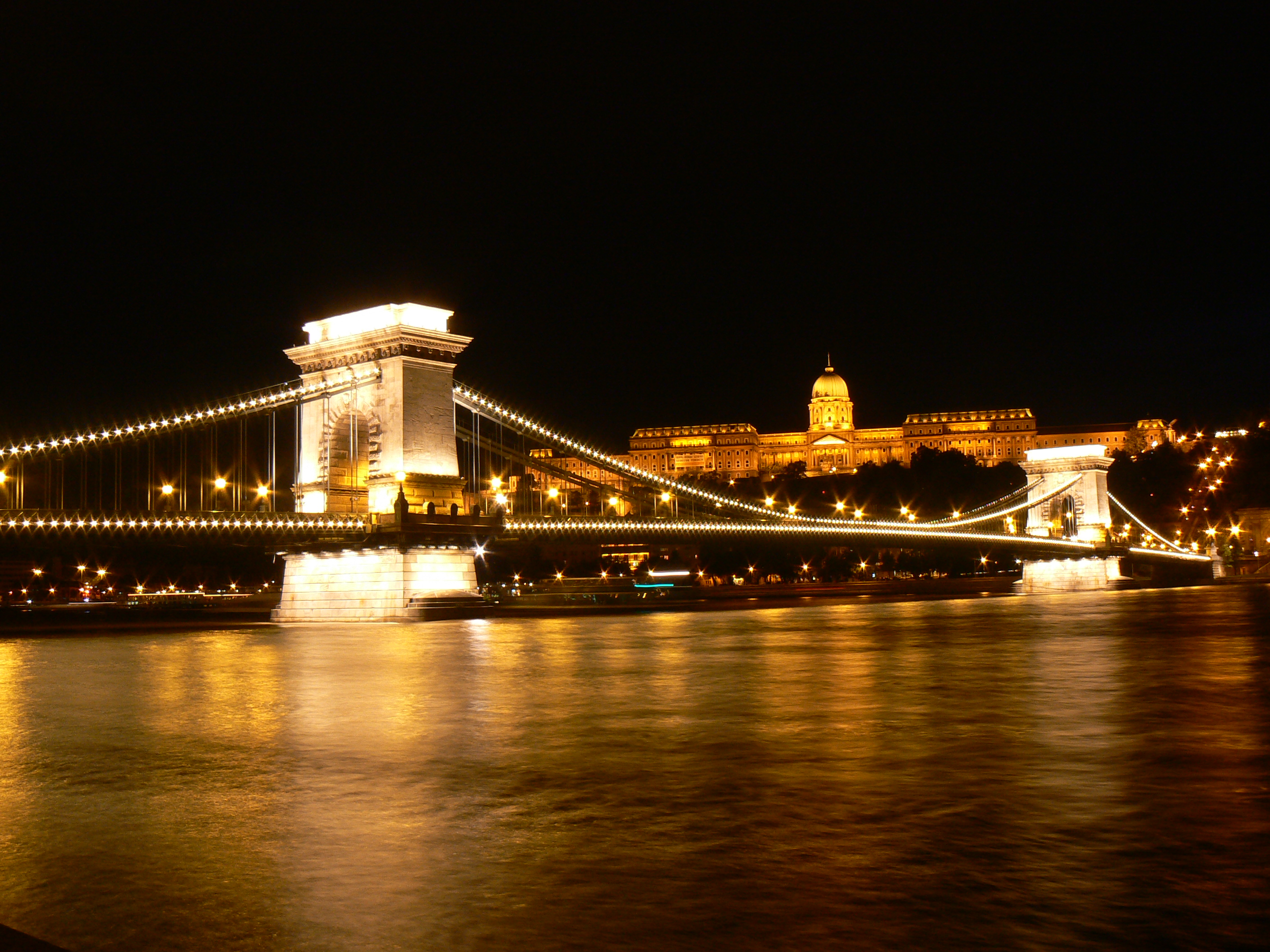 Most Łańcuchowy im.Istvána Széchenyiego w Budapeszcie widok nocą. Na drugim planie Zamek Królewski.